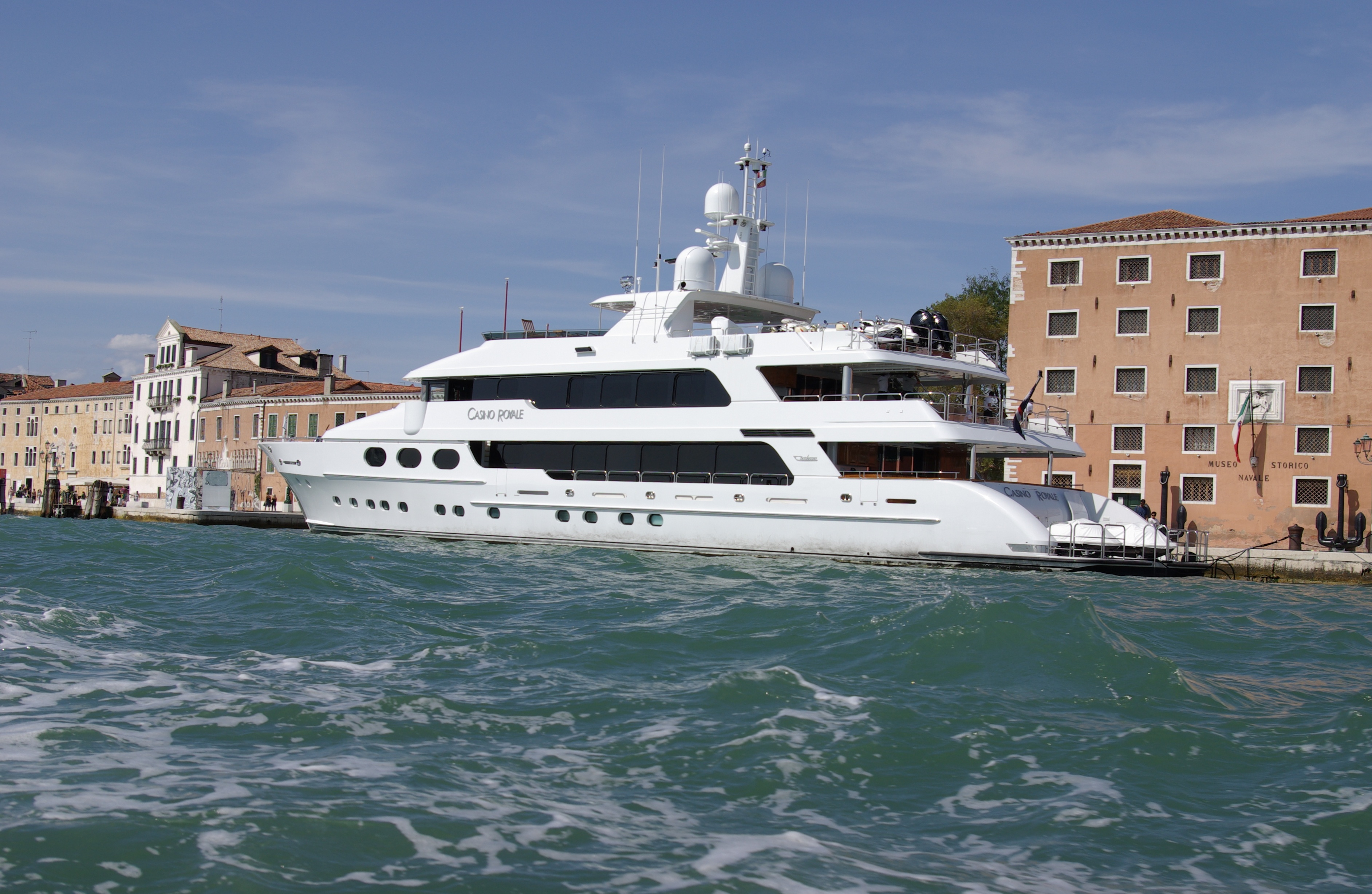 Die Luxusyacht Casino Royale in Venedig